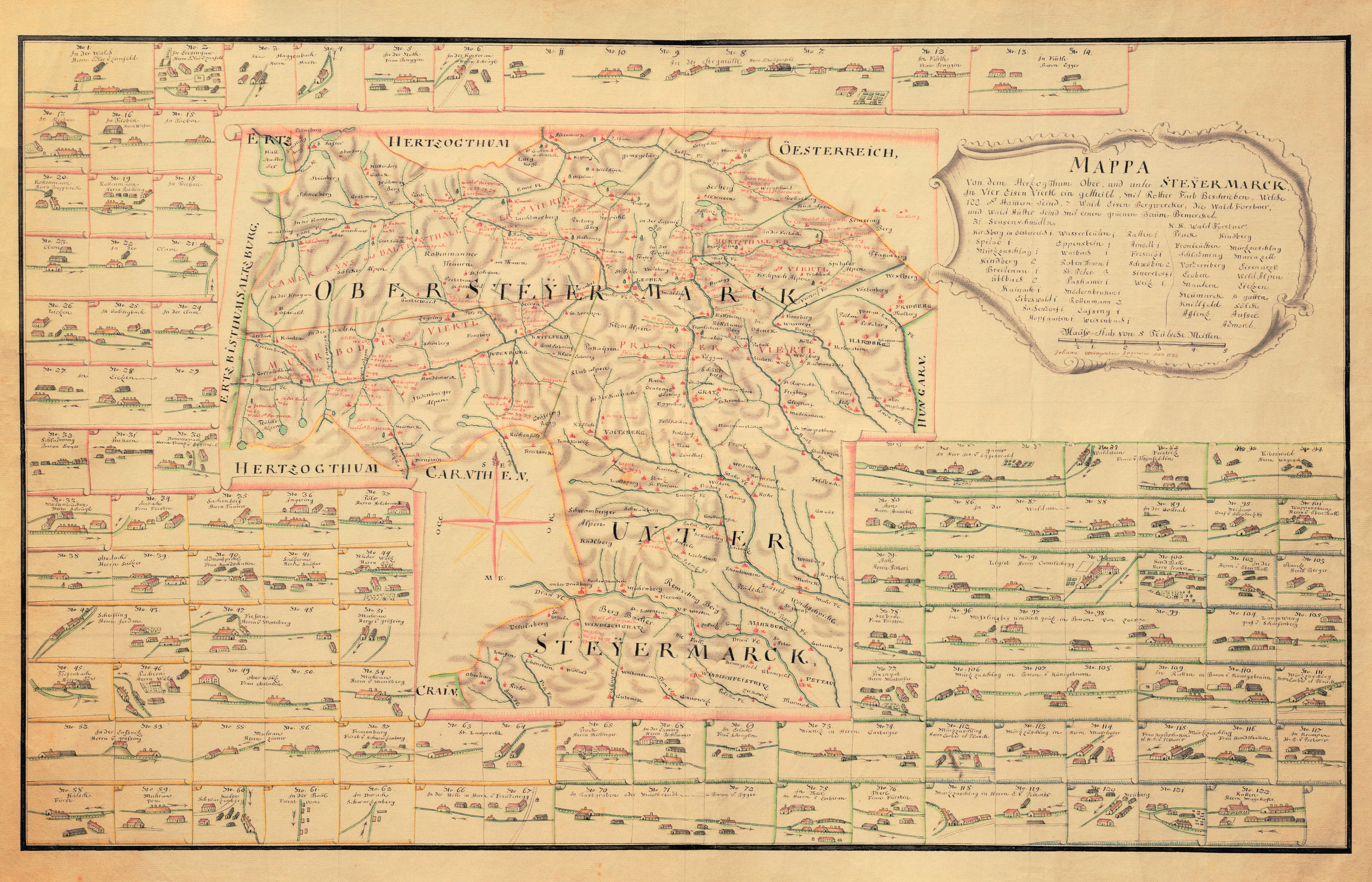 historische Landkarte: Mappa von dem HerzogThum Ober, und unter Steyermarck in Vier Eisen Viertl ein getheilt, mit Rother Farb Beschrieben, Welche 122 Eisenhamern seind, 7 Wald Eisen Bergwercker; die WaldForstamer und Wald Hütter sind mit einen günen Baum Bemercket. Lit. Helfried Valentinisch: "Mappa ...". In: Steiermark Edition, Erzberg-Handwerk-Eisenbahn, Blatt 05011 Archiv Verlag 1991 ff. Paul Werner Roth (Hg.) Erz und Eisen in der Grünen Mark. Beiträge zum steirischen Eisenwesen. Graz 1984. (Steir. Landesausstellung. 1984.)